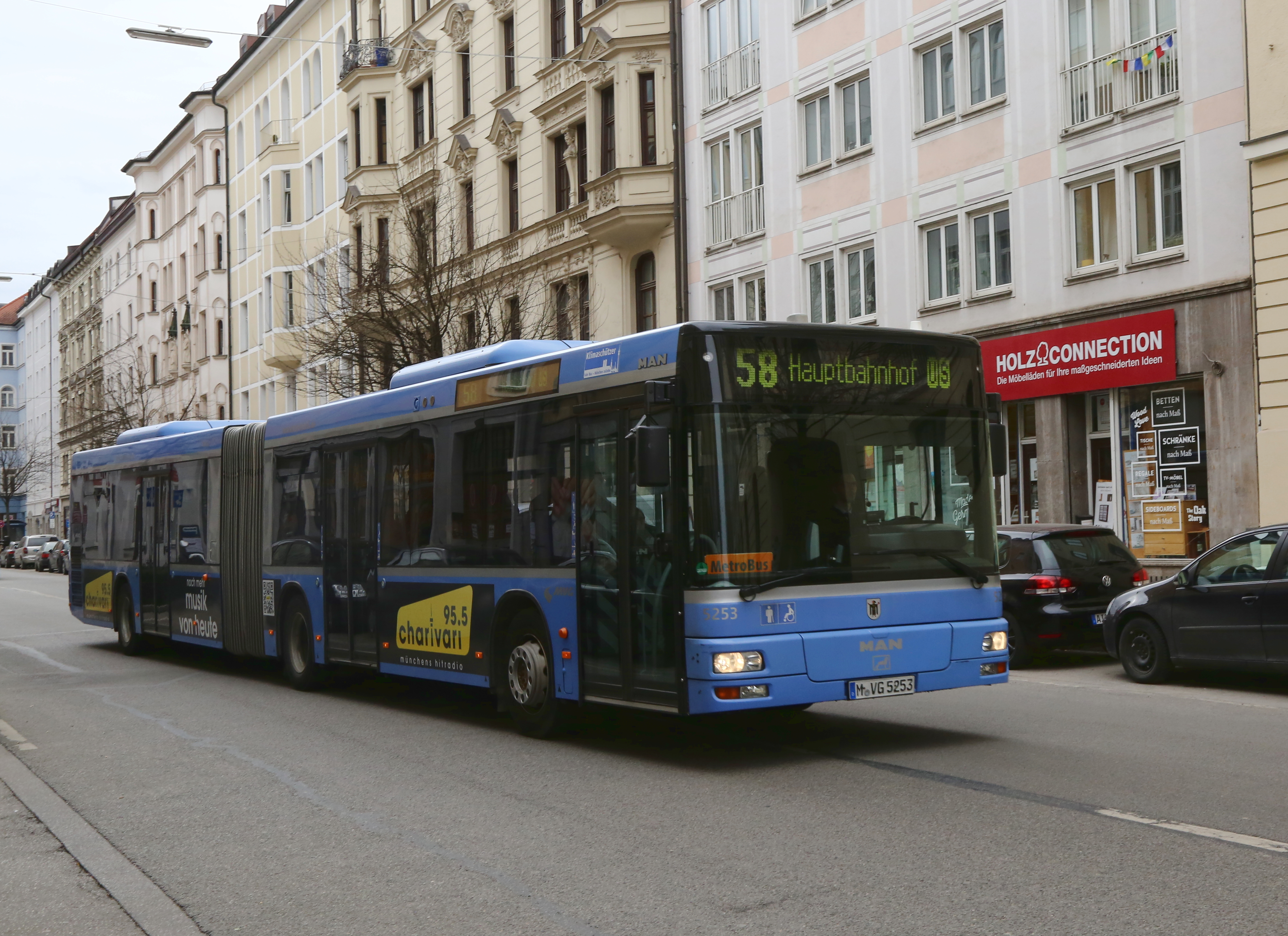 Der für den CityRing ab Sommer 2018 eingestellte MetroBus 58 zwischen Arbeitsamt München und Goetheplatz